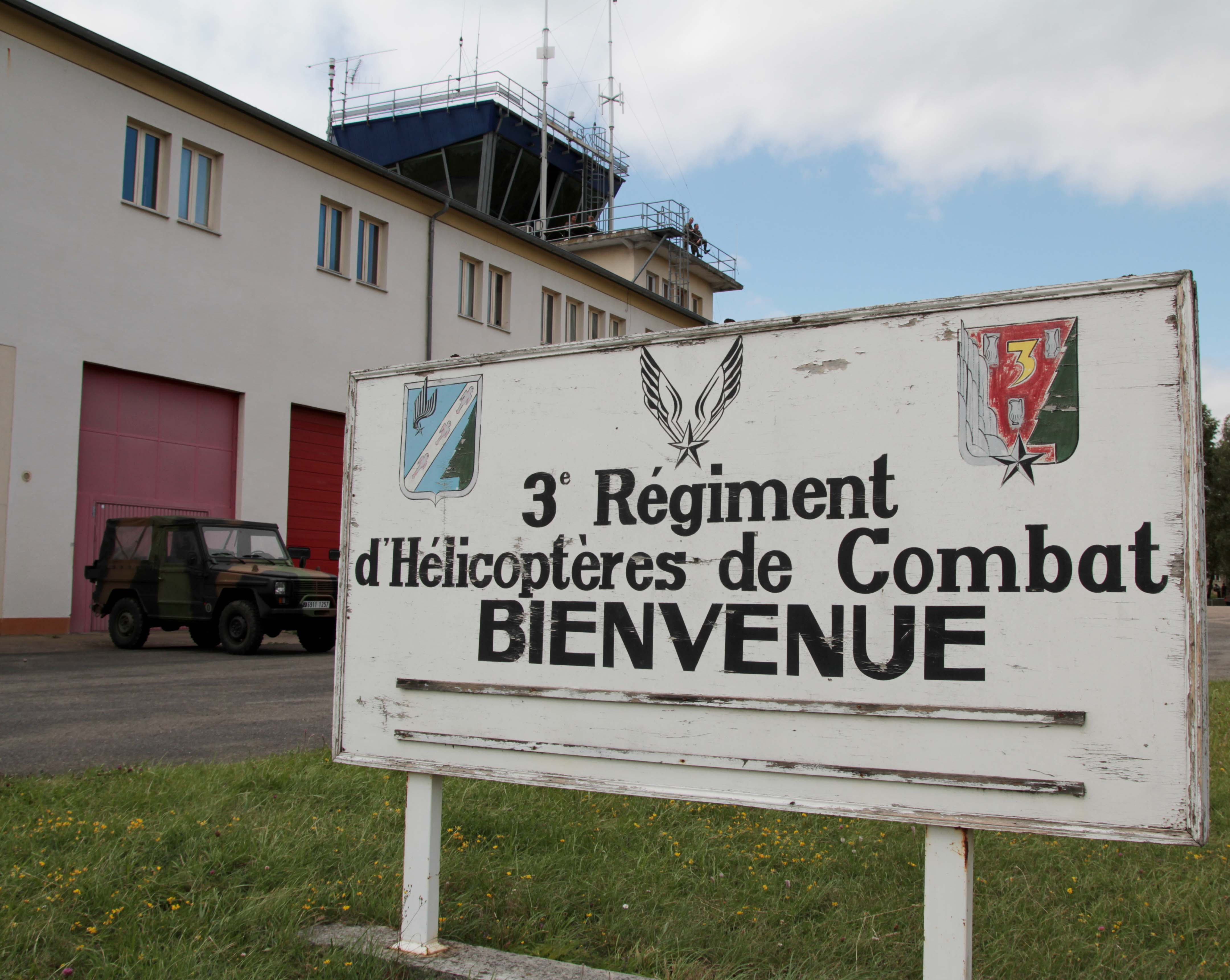 Tour de contrôle Etain-Rouvres, base du 3e RHC